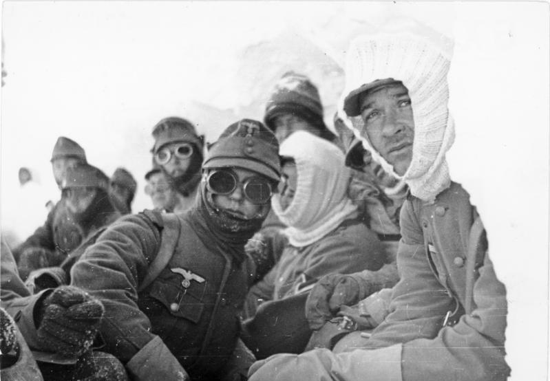 Kämpfe um Narvik: Eine Gruppe deutscher Gebirgsjäger bei Narvik 7660-40